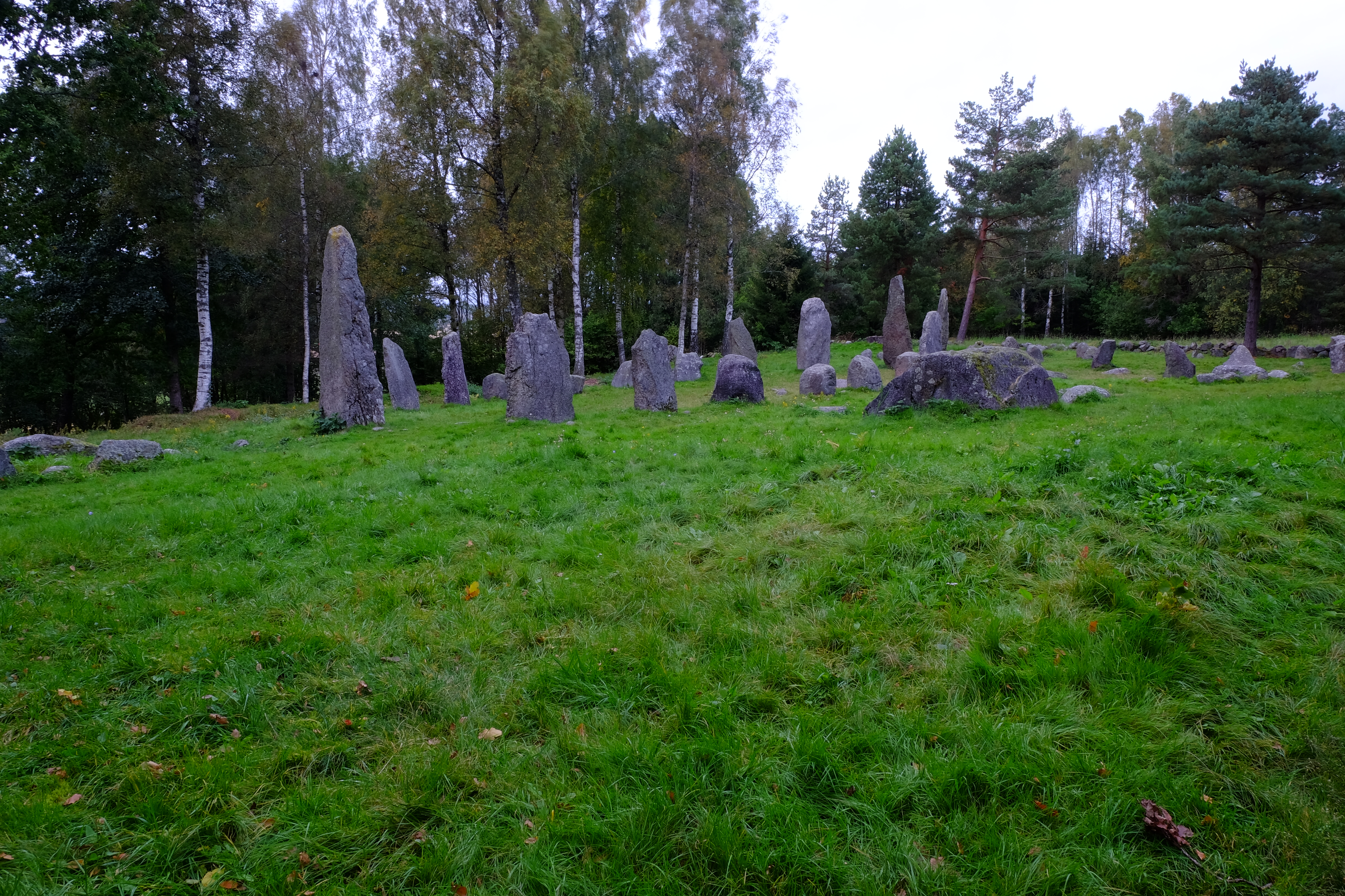 Istrehågan er en steinsetting i Vestfold fra jernalderen.